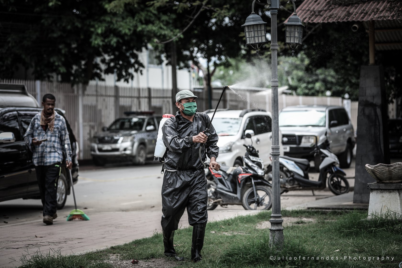 Präventionsmaßnahmen am Präsidentenpalast Osttimors